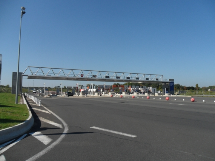 Mautstelle "Barrière de péage de Veigné" bei Tours im Streckenverlauf der Autoroute A85